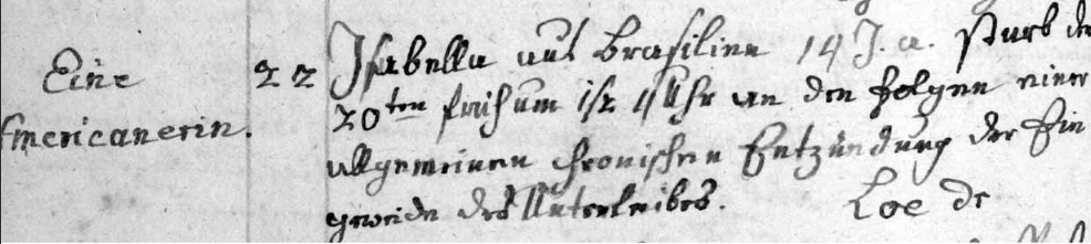 Sterbebucheintrag für die aus Brasilien stammende Miranha/Isabella